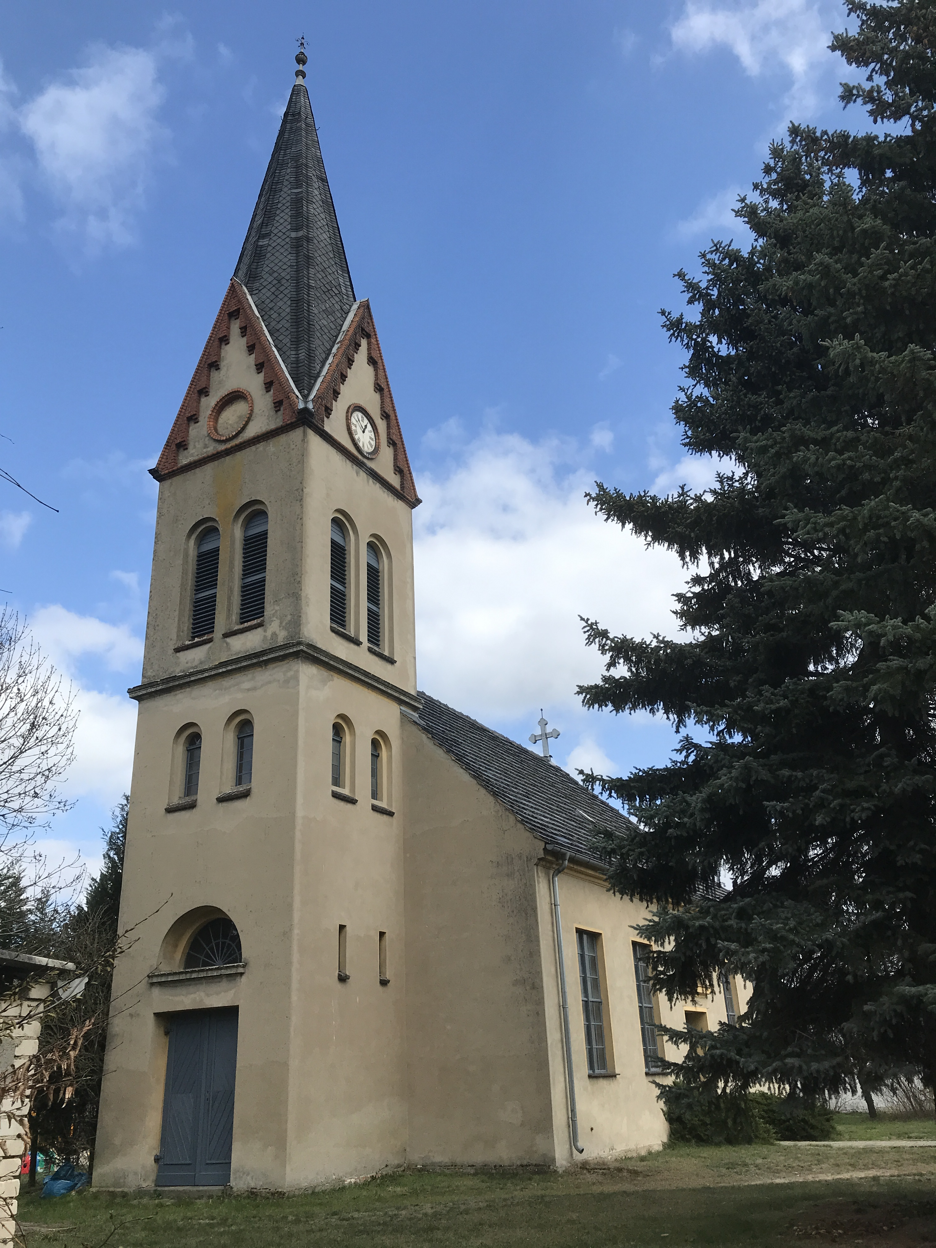 Die Dorfkirche Zinnitz, einem Ortsteil der Stadt Calau im Landkreis Oberspreewald-Lausitz in Brandenburg entstand im Jahr 1818 im Auftrag des Gutsbesitzers.